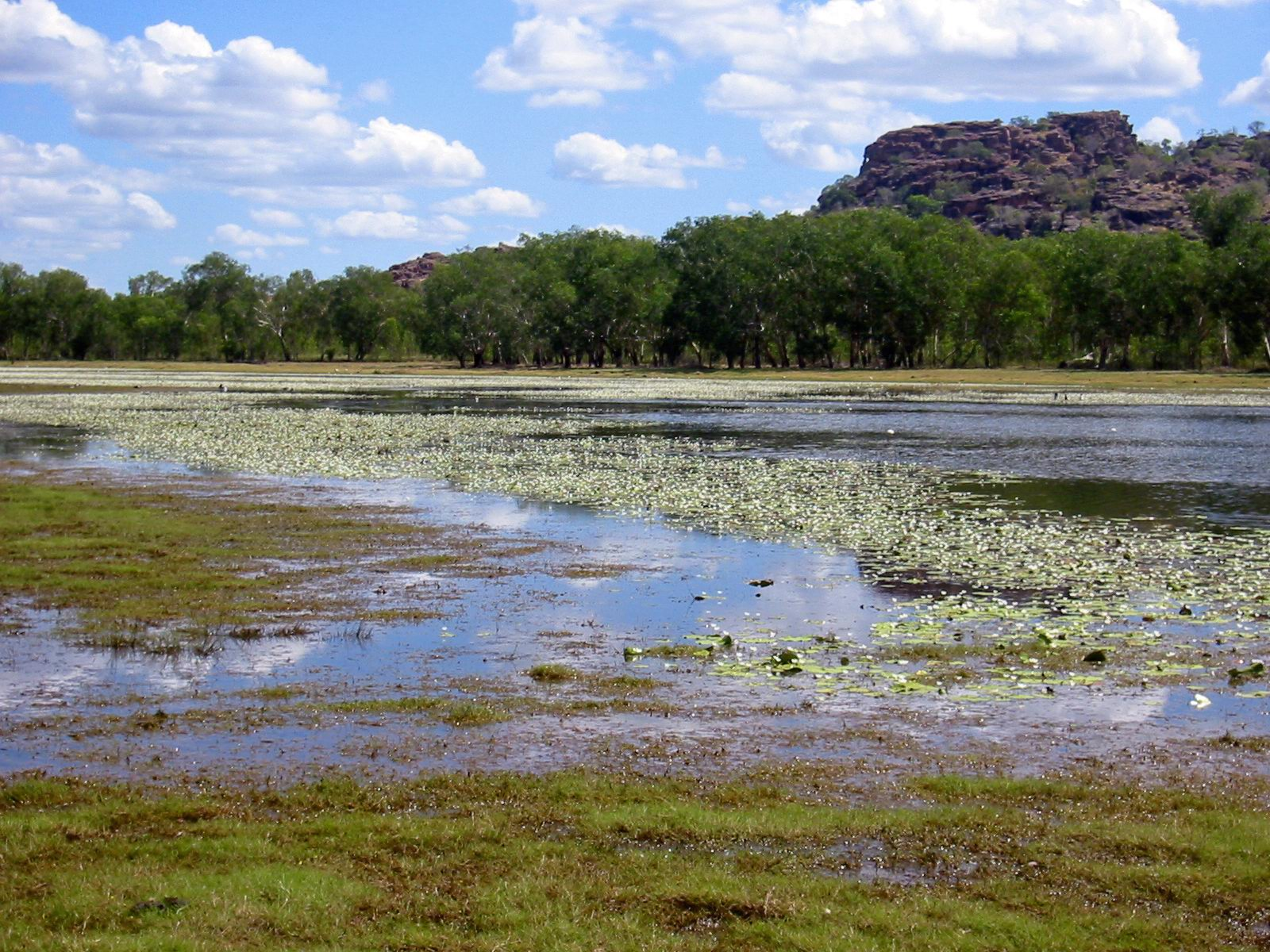 Anbangbang Billabong, Kakadu National Park, Australia